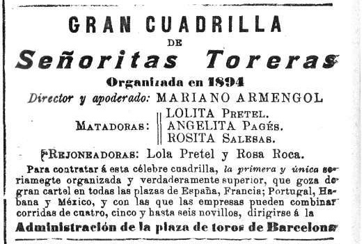 Anuncio de la Gran Cuadrilla de Señoritas Toreras, organizada en Barcelona en 1894.